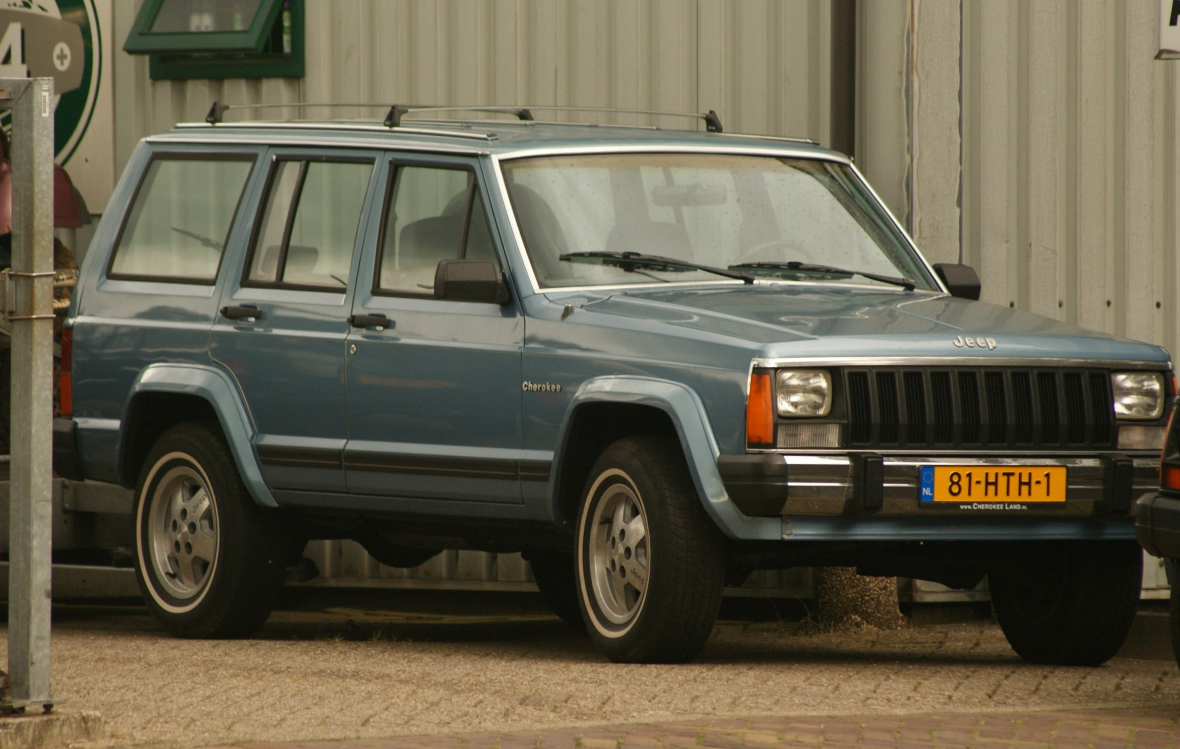 81-HTH-1 Maasbach 4x4